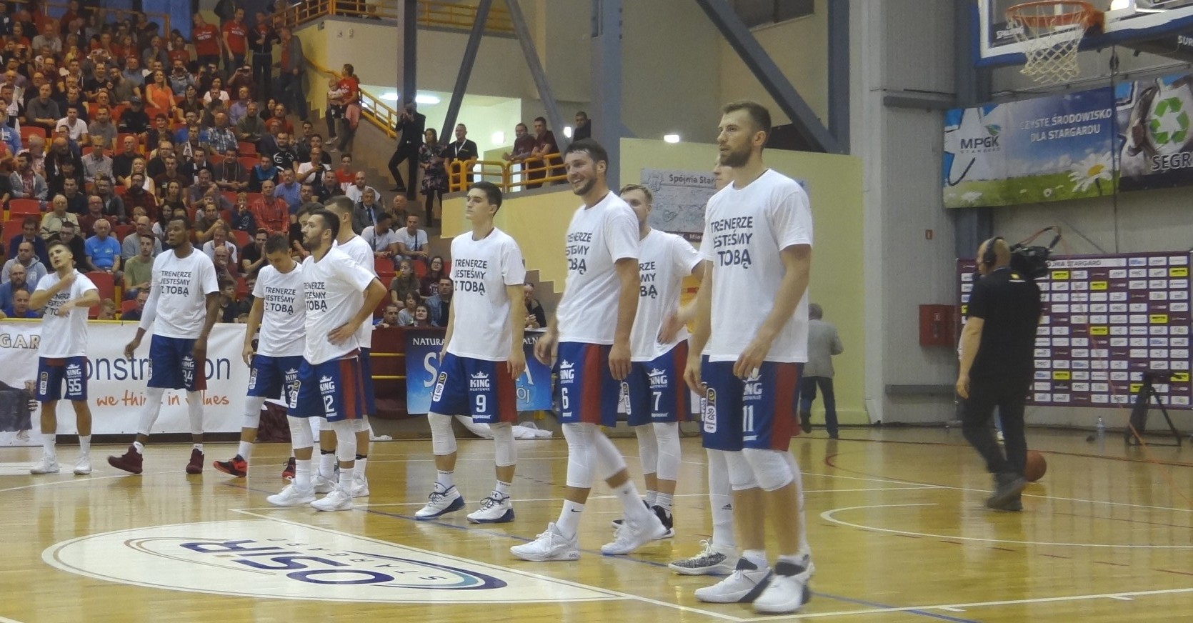 King Szczecin (06. 10. 2018)